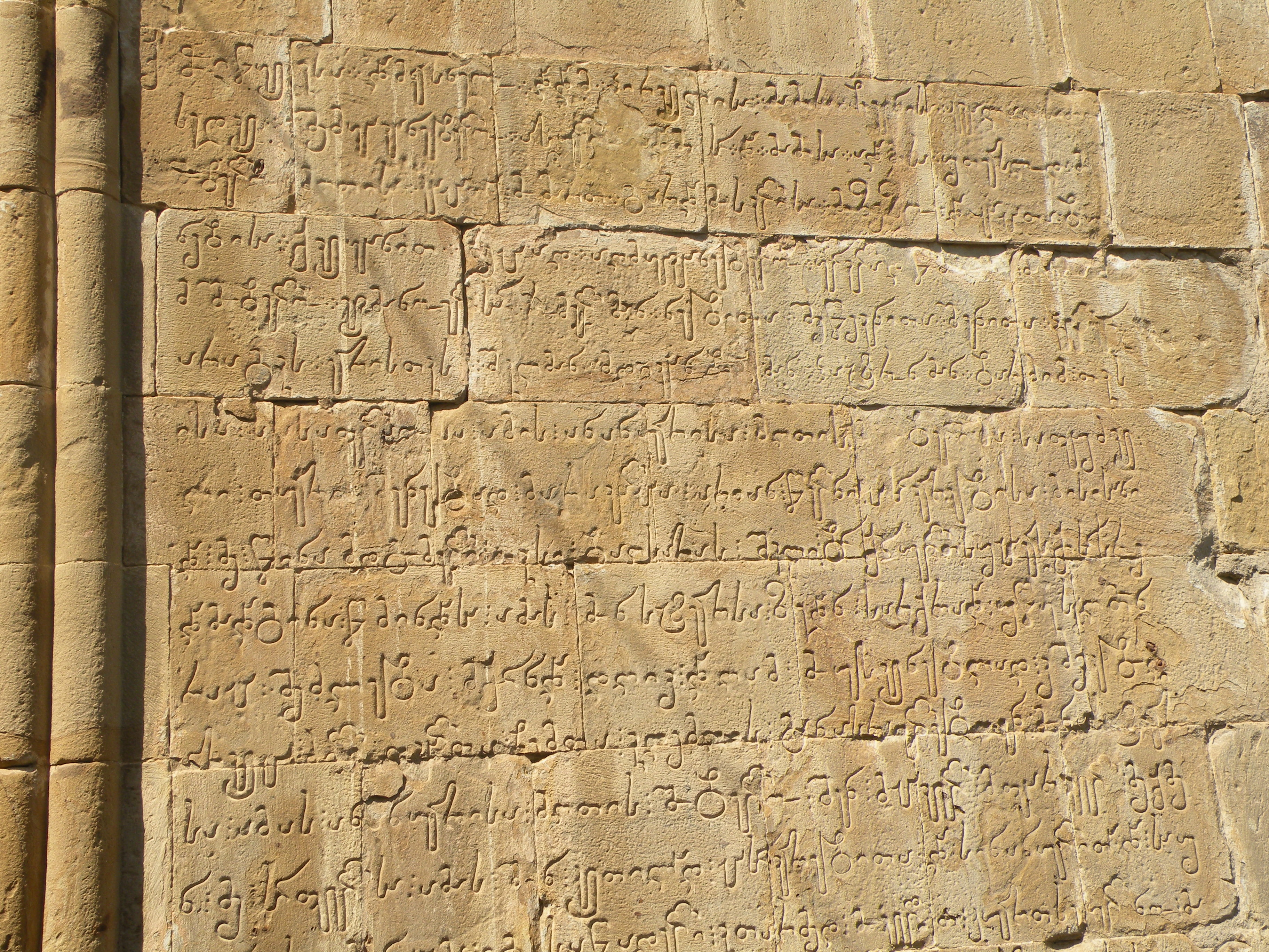 Inscriptions